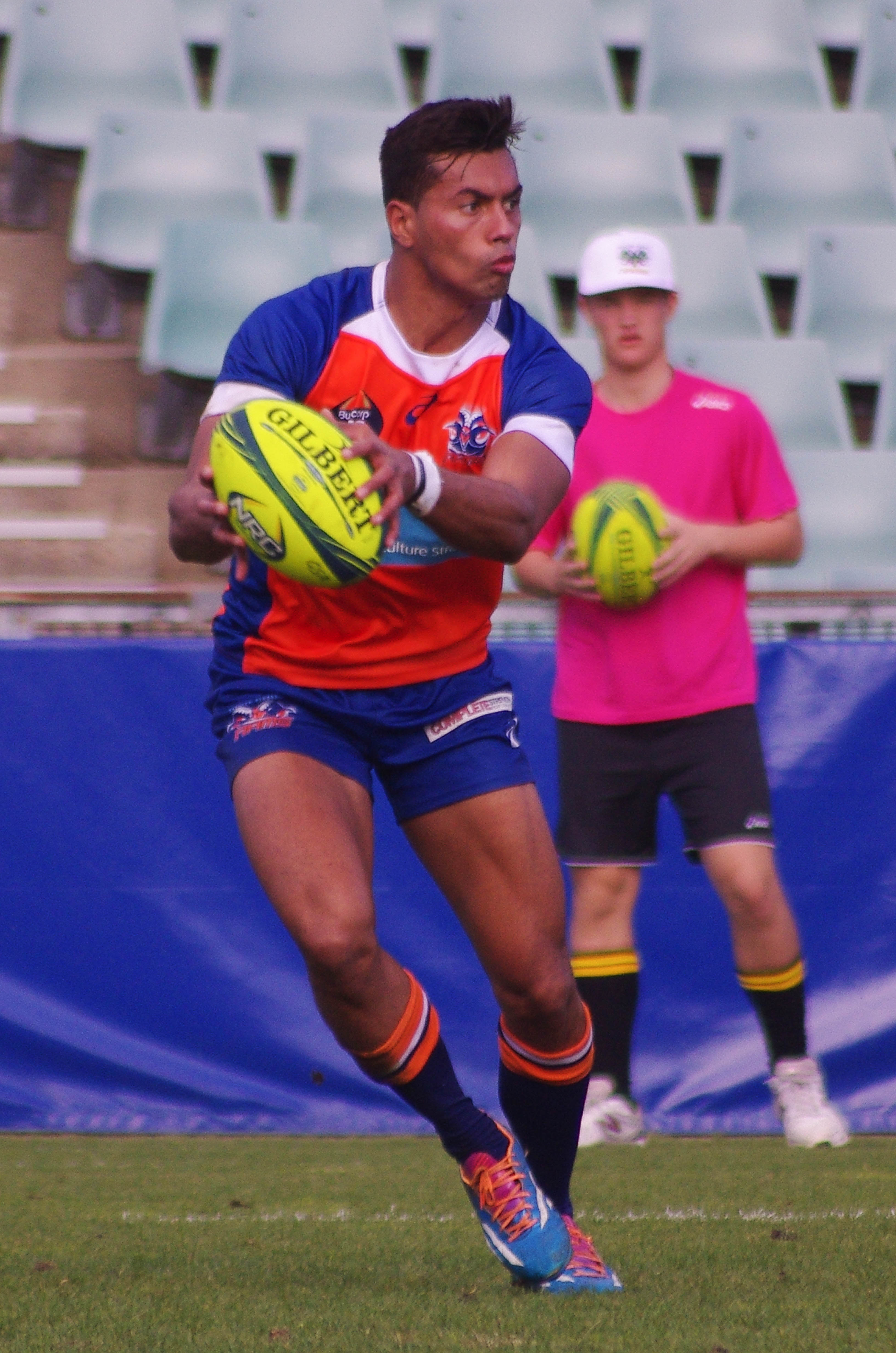 BEN VOLA VOLA